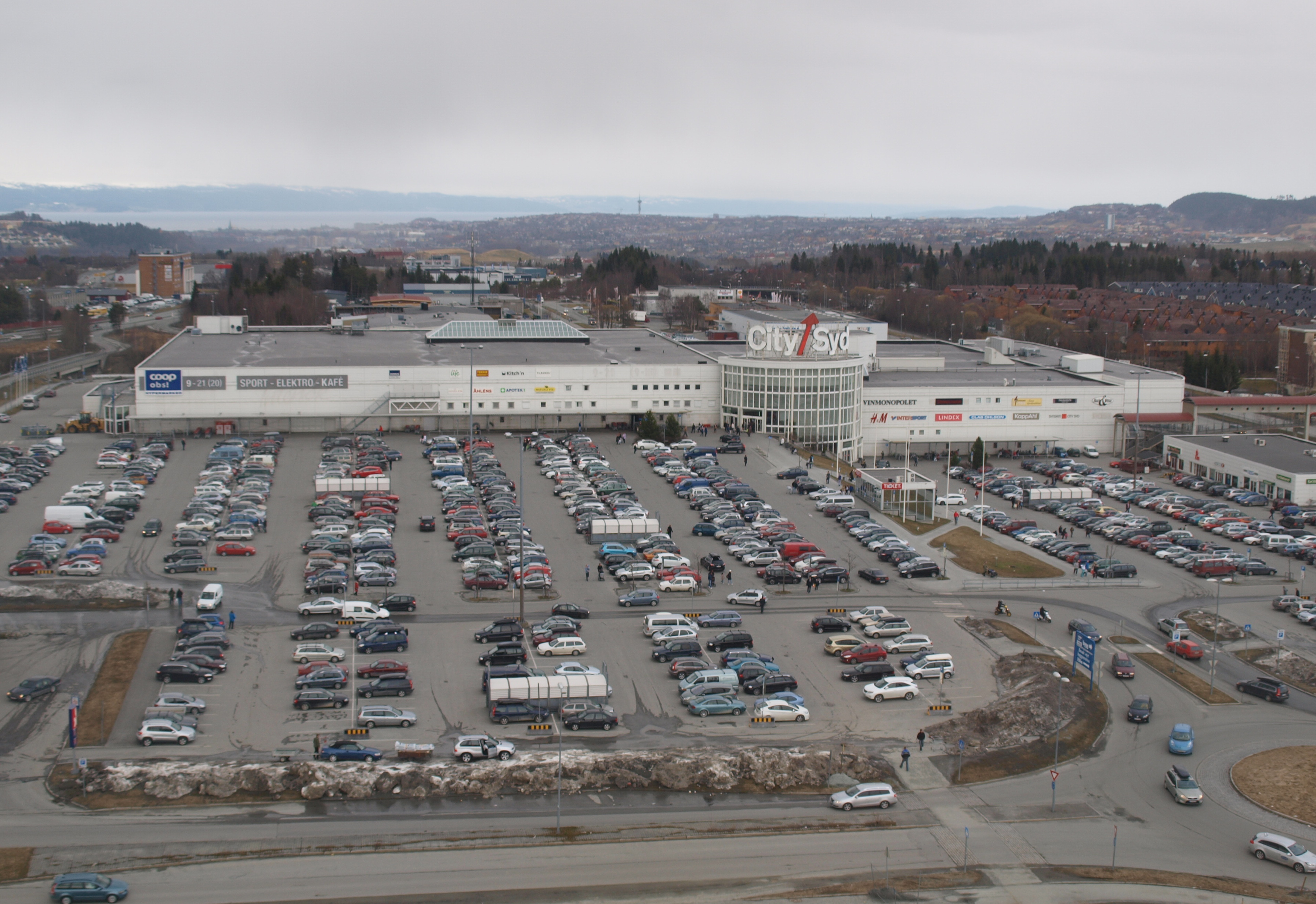 City Syd i Trondheim.